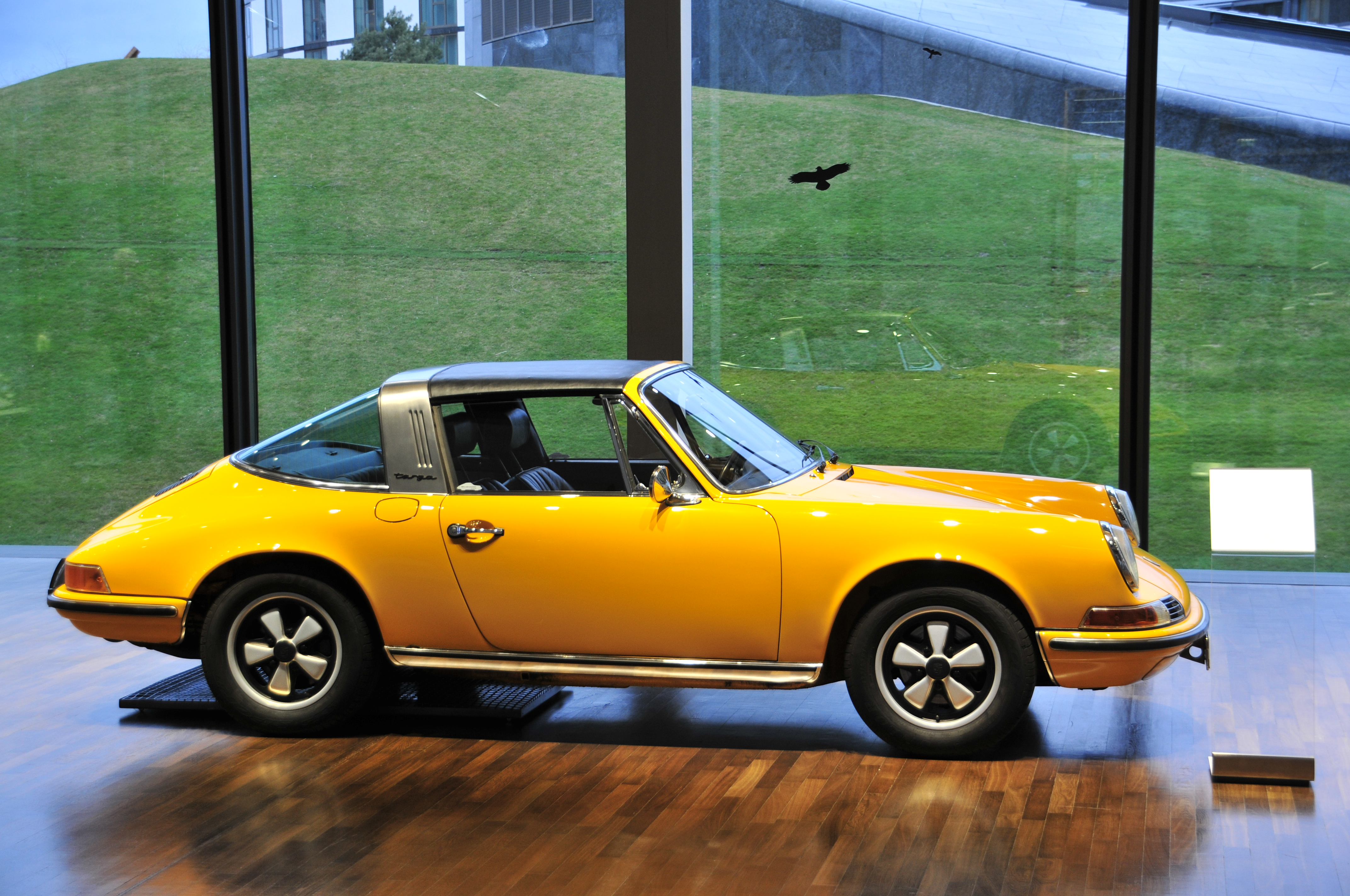 Fahrzeug in der Autostadt Wolfsburg